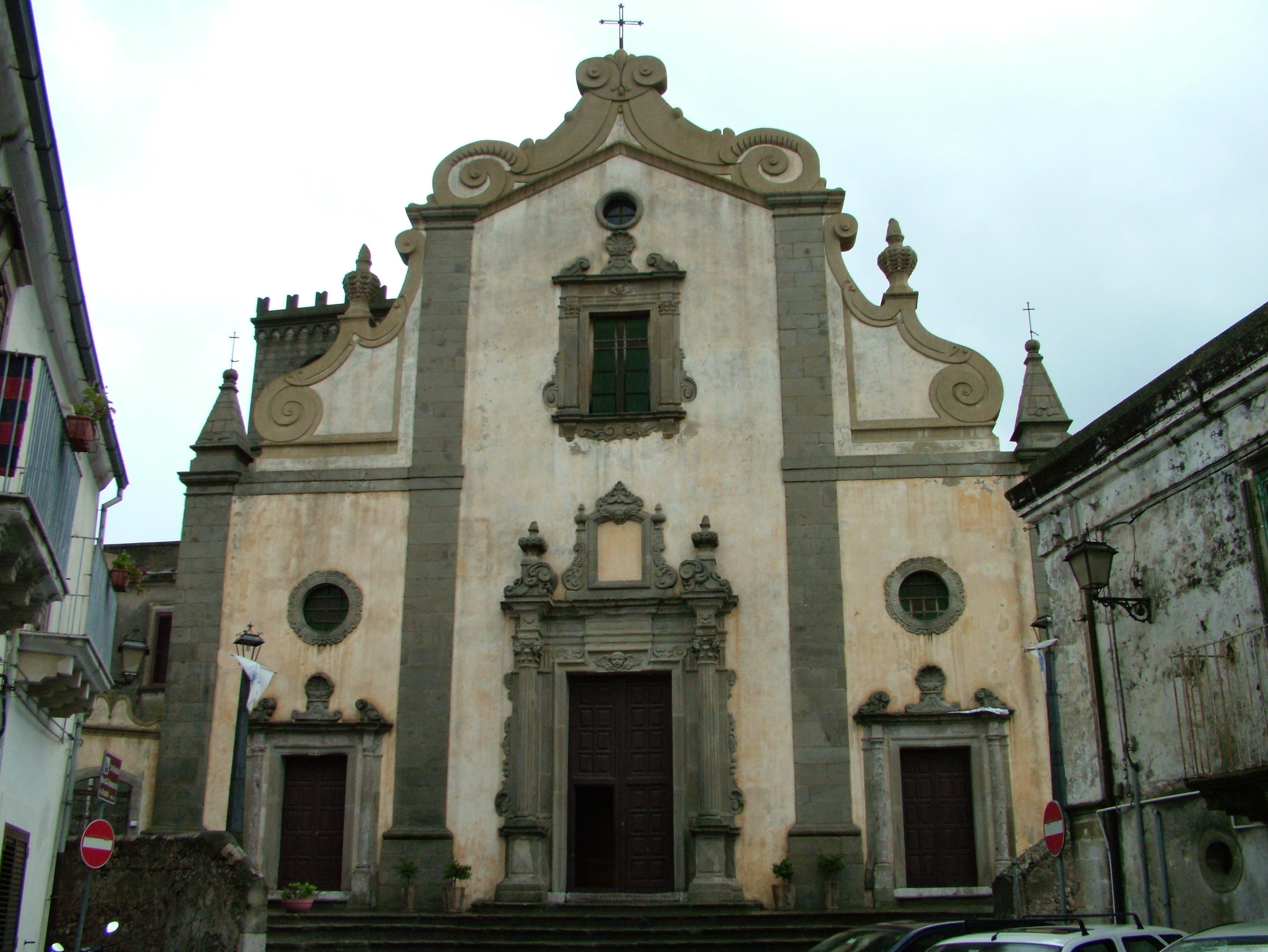 Forza d'Agrò, Sizilien, die Kirche Maria SS Annunziata e Assunta oder Kathedrale